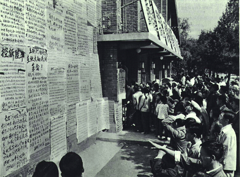 1966-10 1966年对北京大学陆平彭佩云的批判